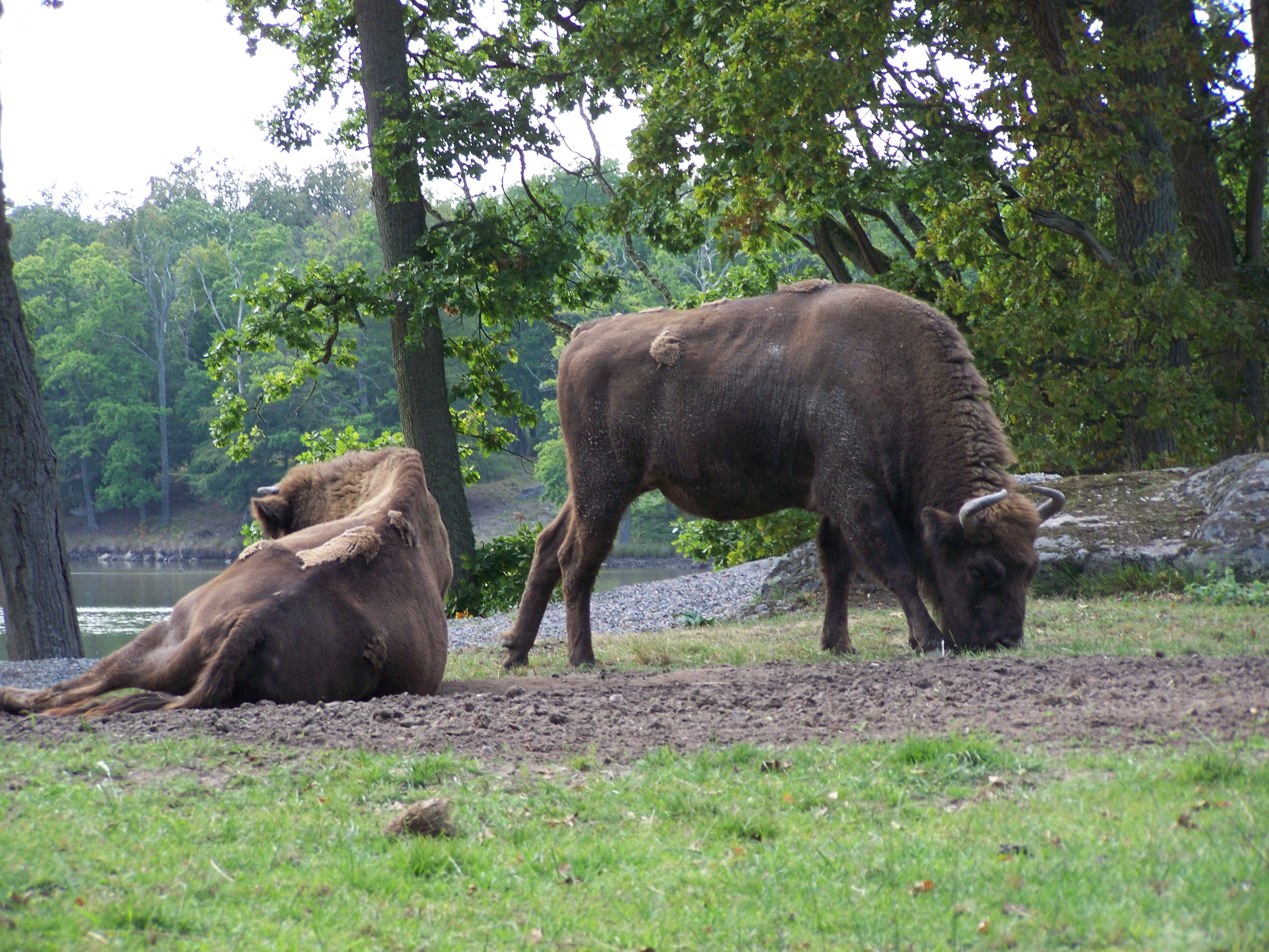 In Schweden. Eriksberg, Blekinge